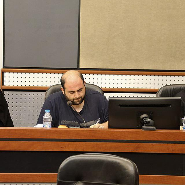 محمد مساعد در سال 1397